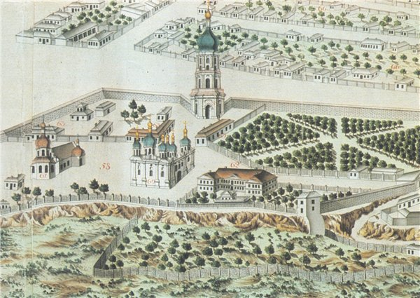 Вид Микольського монастиря.: «Перспект Киево-Печерской крепости и части форштата с Московской стороны» (1783 г.).